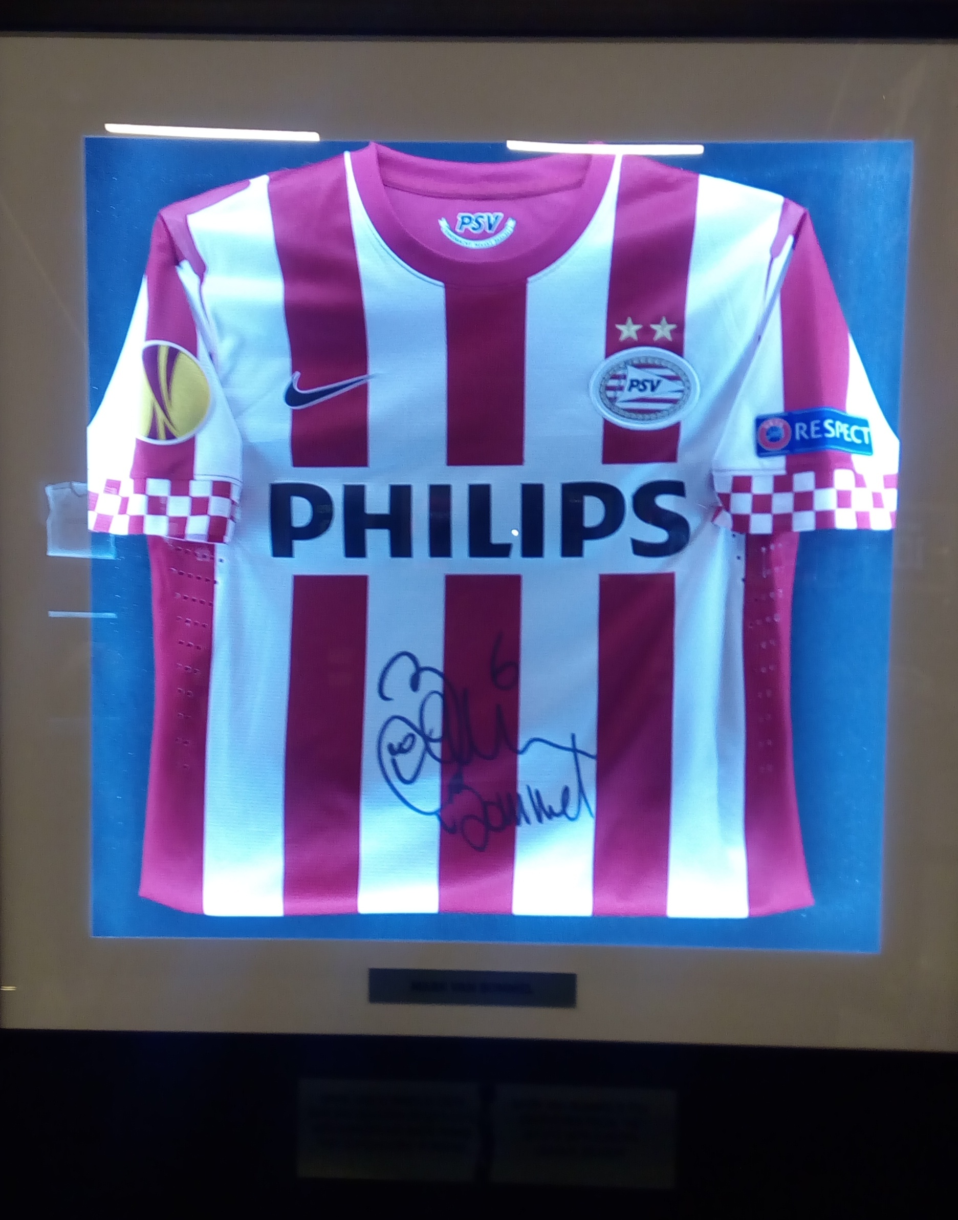 Avropa Liqası Muzeyi Bakıda